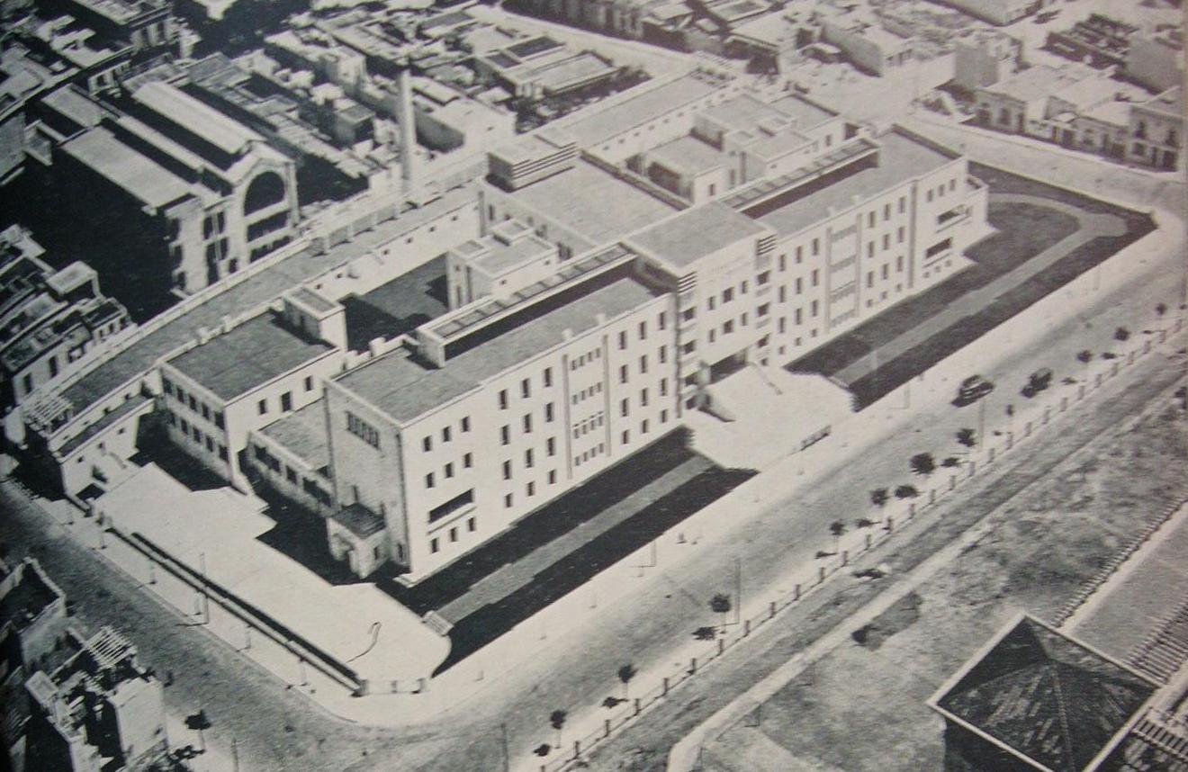 Vista aérea del edificio de la Maternidad Ramón Sardá, en el barrio de Parque Patricios. Buenos Aires, Argentina.